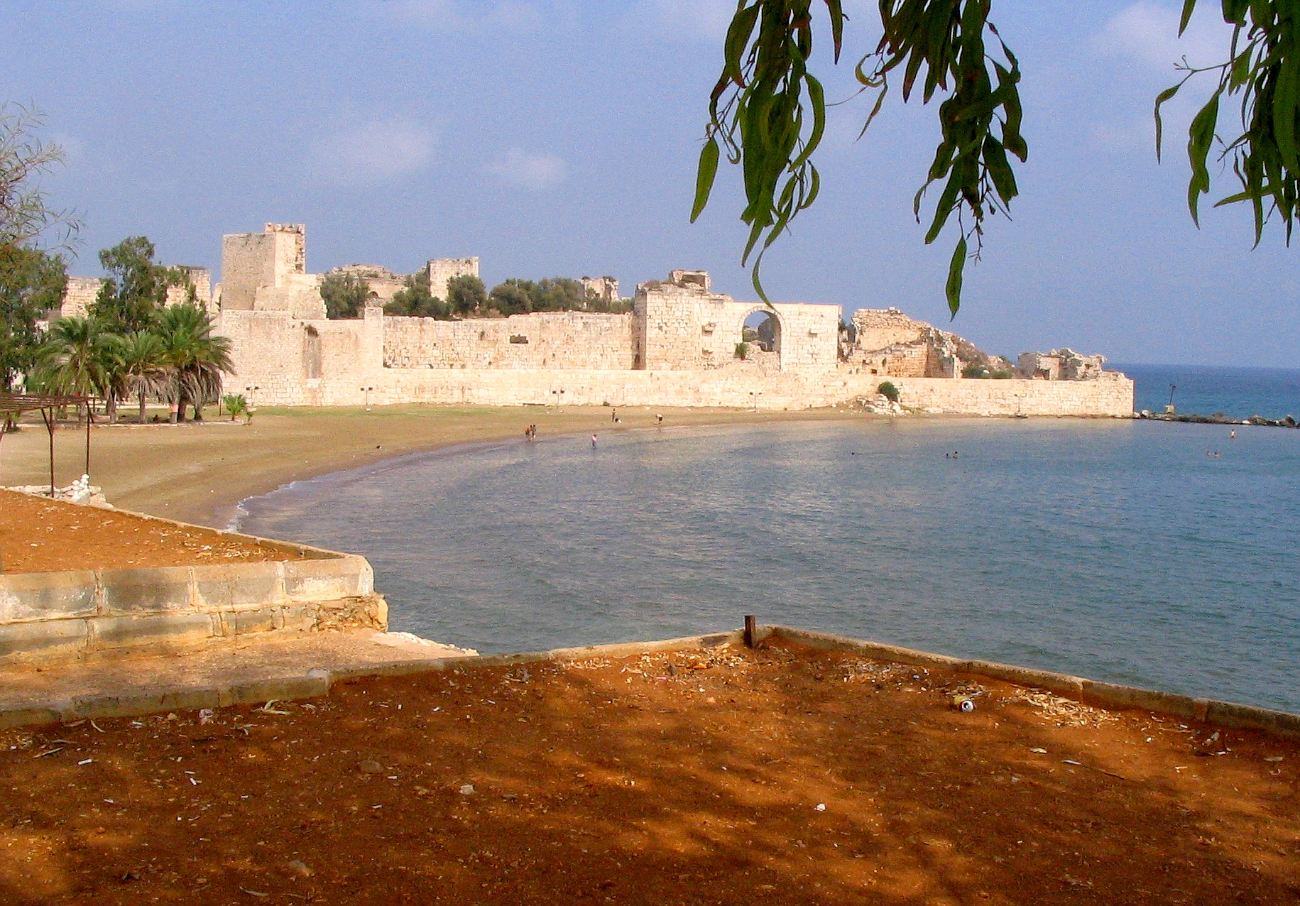 Landburg Korykos bei Kızkalesi, Südtürkei